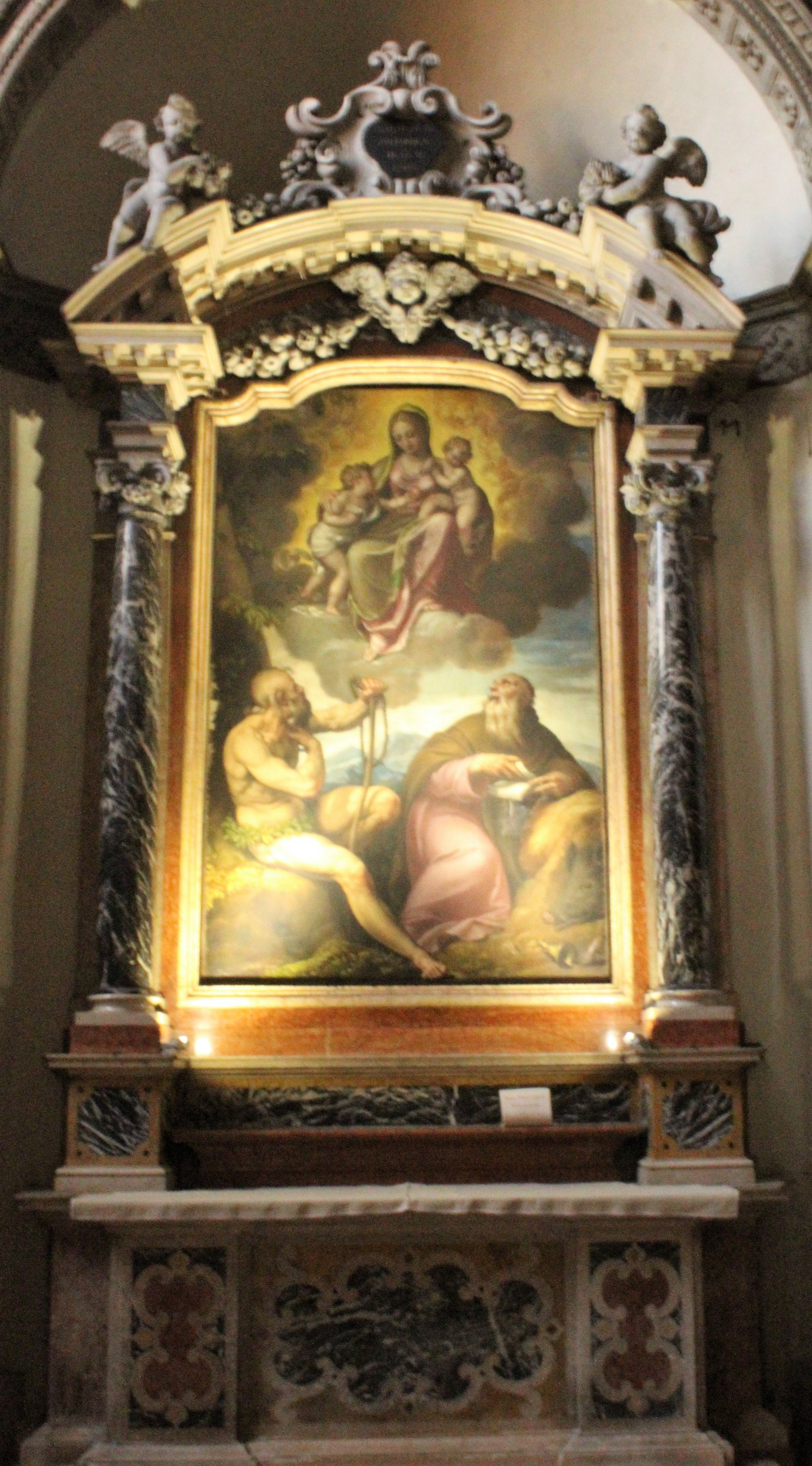 Altare dei Tintori, pala raffigurante "Santi Onofrio e Antonio Abate". Autore: Paolo Farinati. Chiesa di San Tomaso Cantuariense, Verona